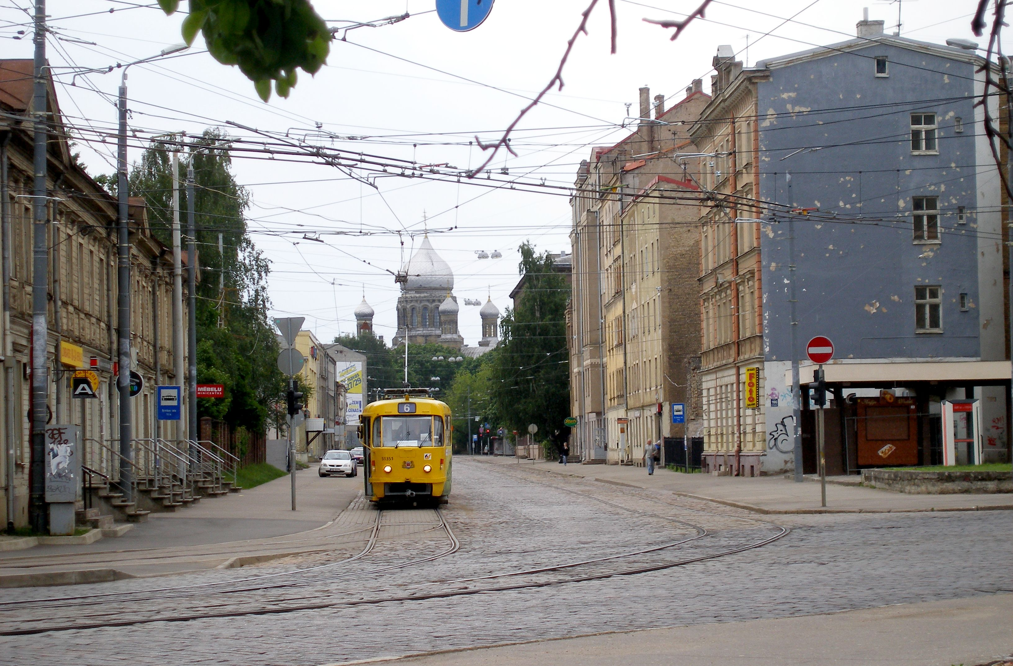 Вулиця Кріш'яня Барона біля вулиці Брівібас. Сфотографована 24 червня 2010 року.